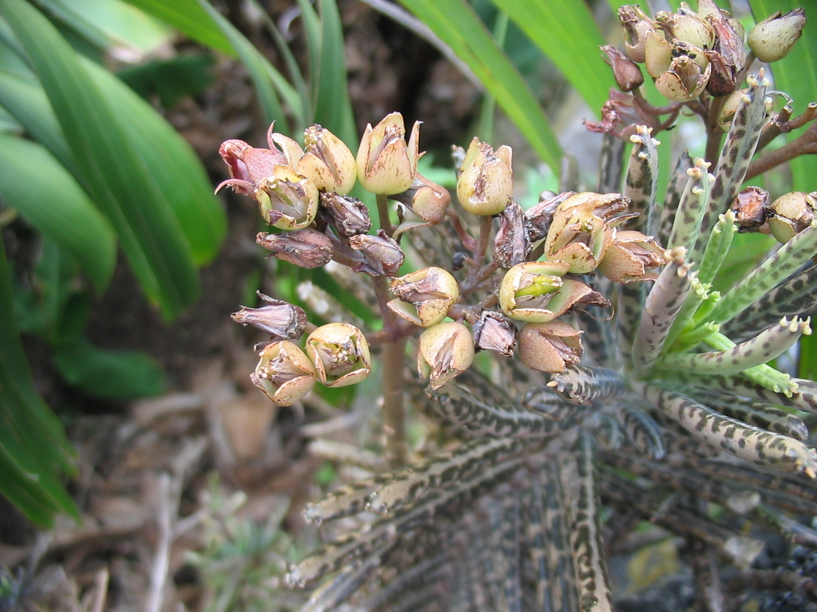 Kalanchoe delagoensis - Fruits